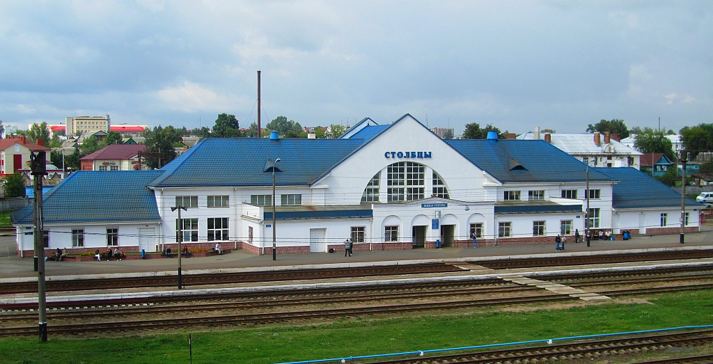 Южная сторона железнодорожного вокзала города Столбцы